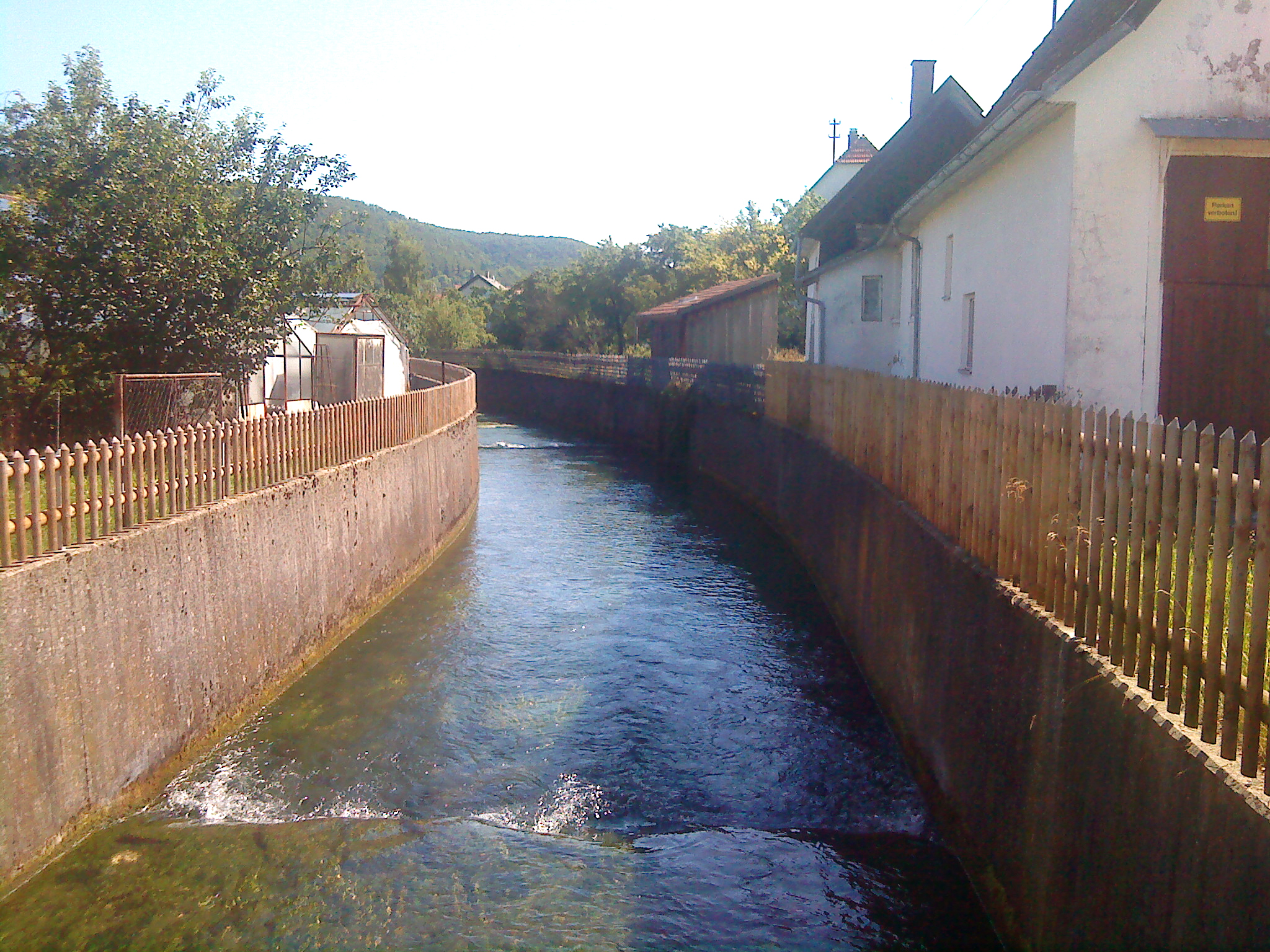 Die Fehla im Stadtgebiet von Burladingen